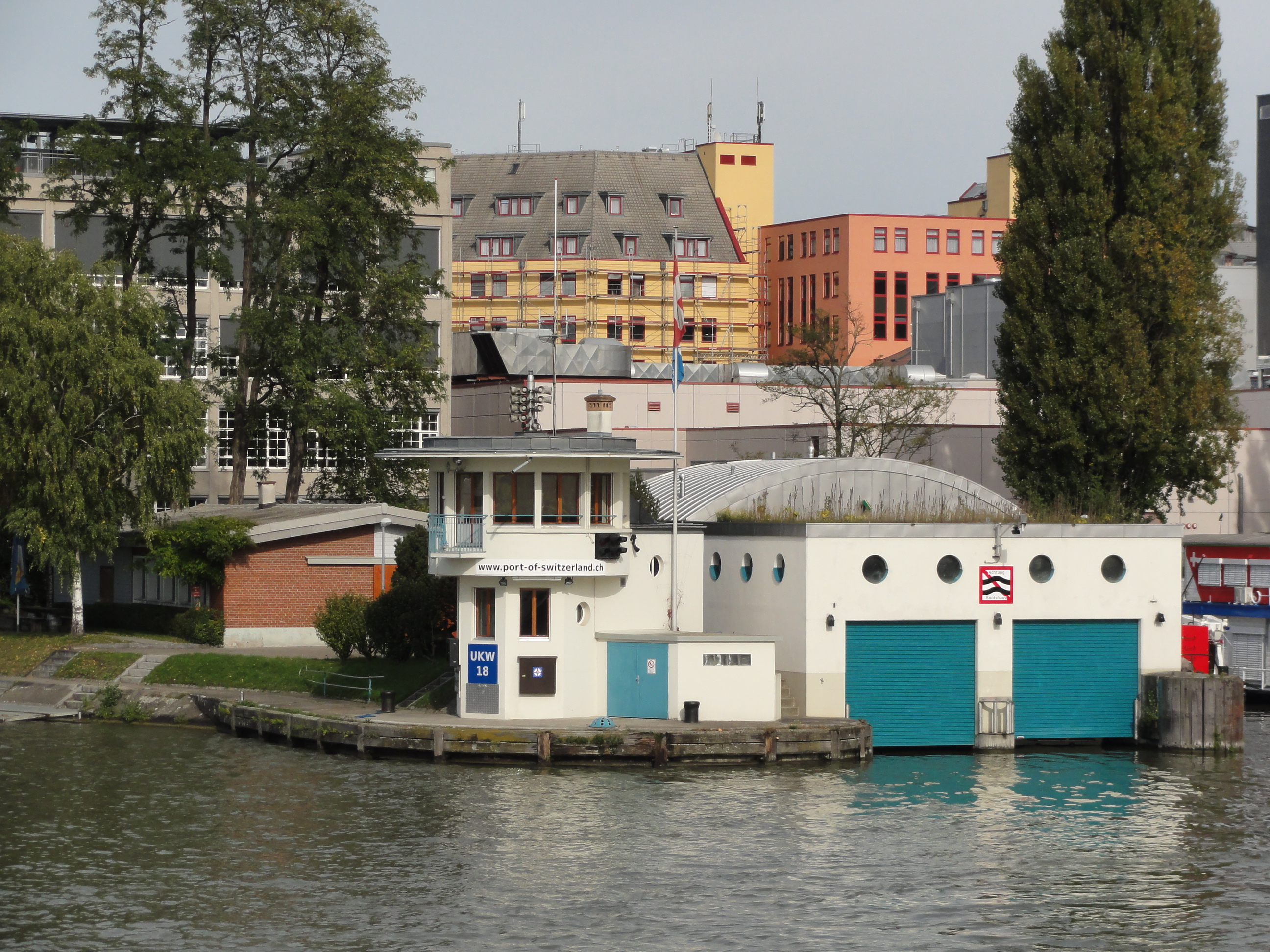 Basel — Hiltalingerstrasse 79